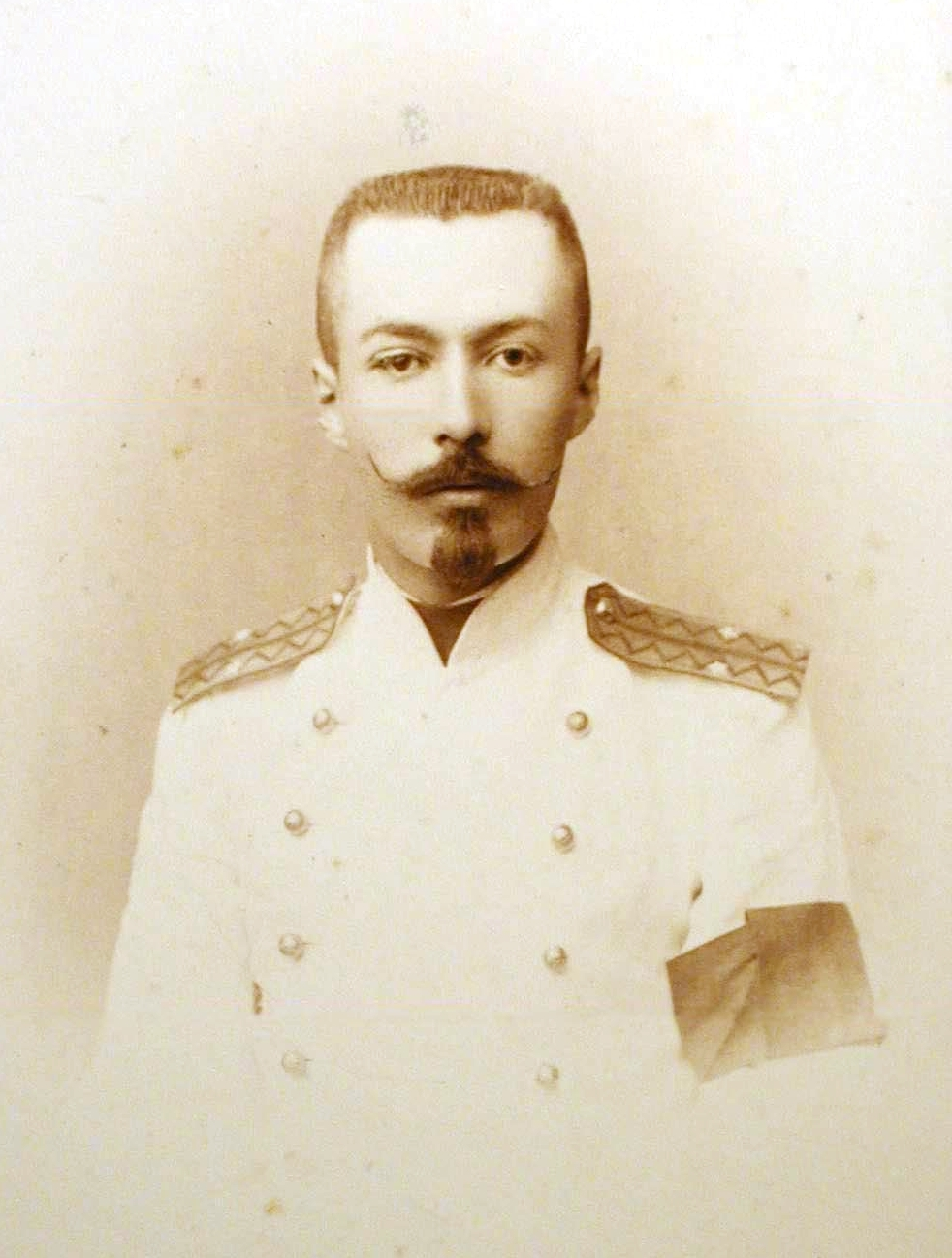 Малама, Владимир Владимирович